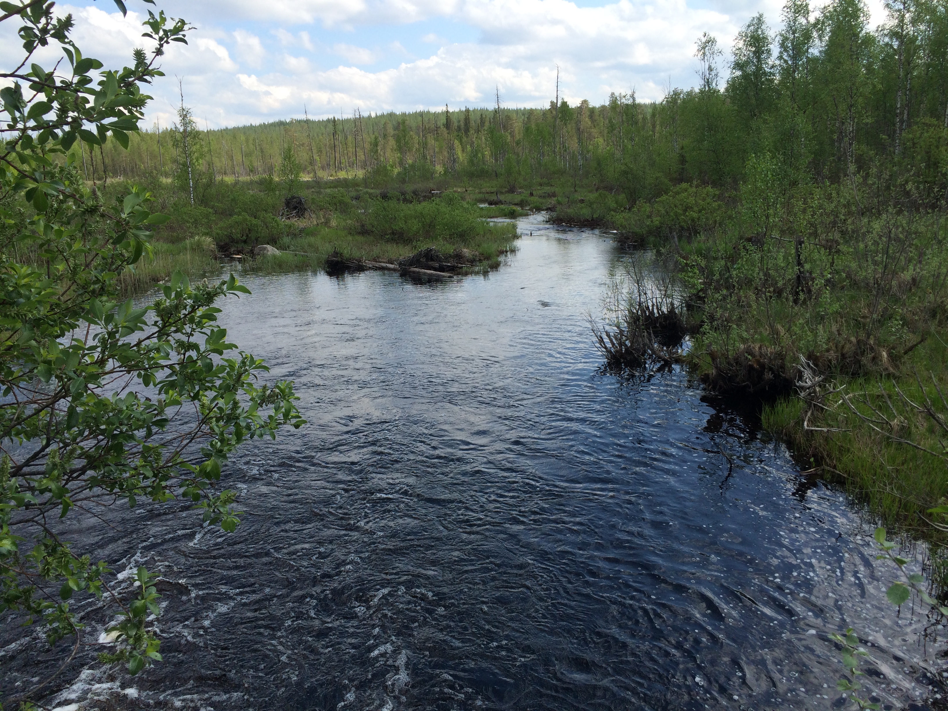 Юнгас (река)